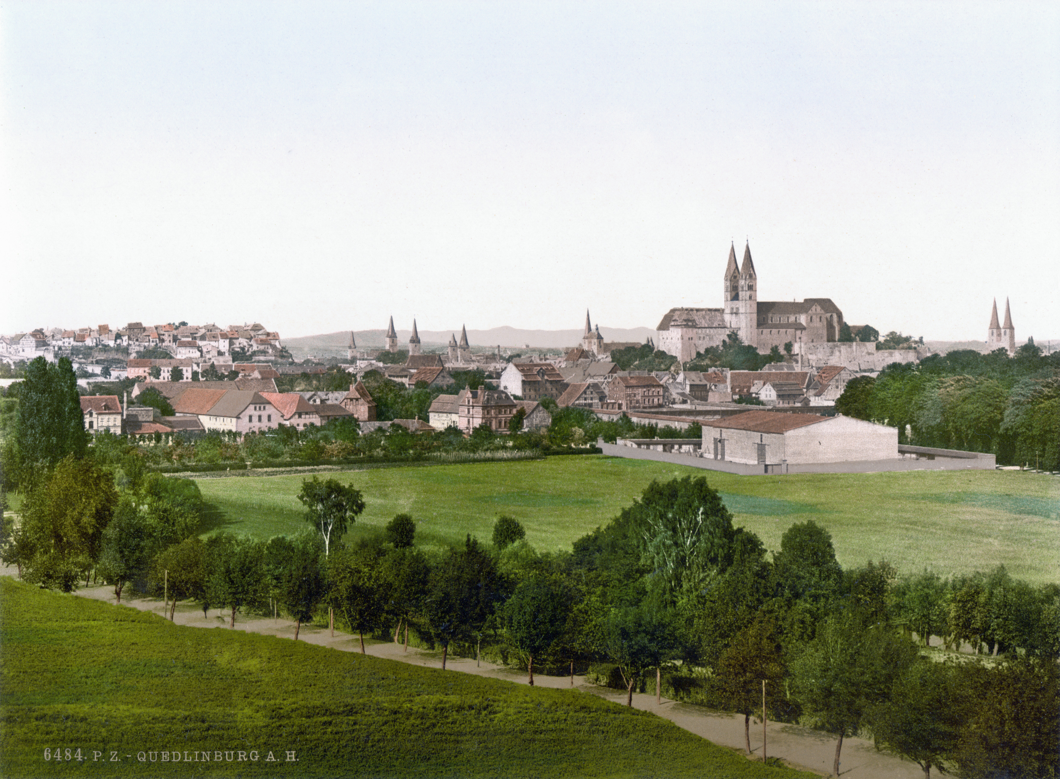 Quedlinburg